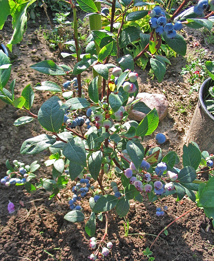 Beschreibung: Amerikanische Heidelbeere (Vaccinium corymbosum) Fotograf: Darkone, 18. August 2004